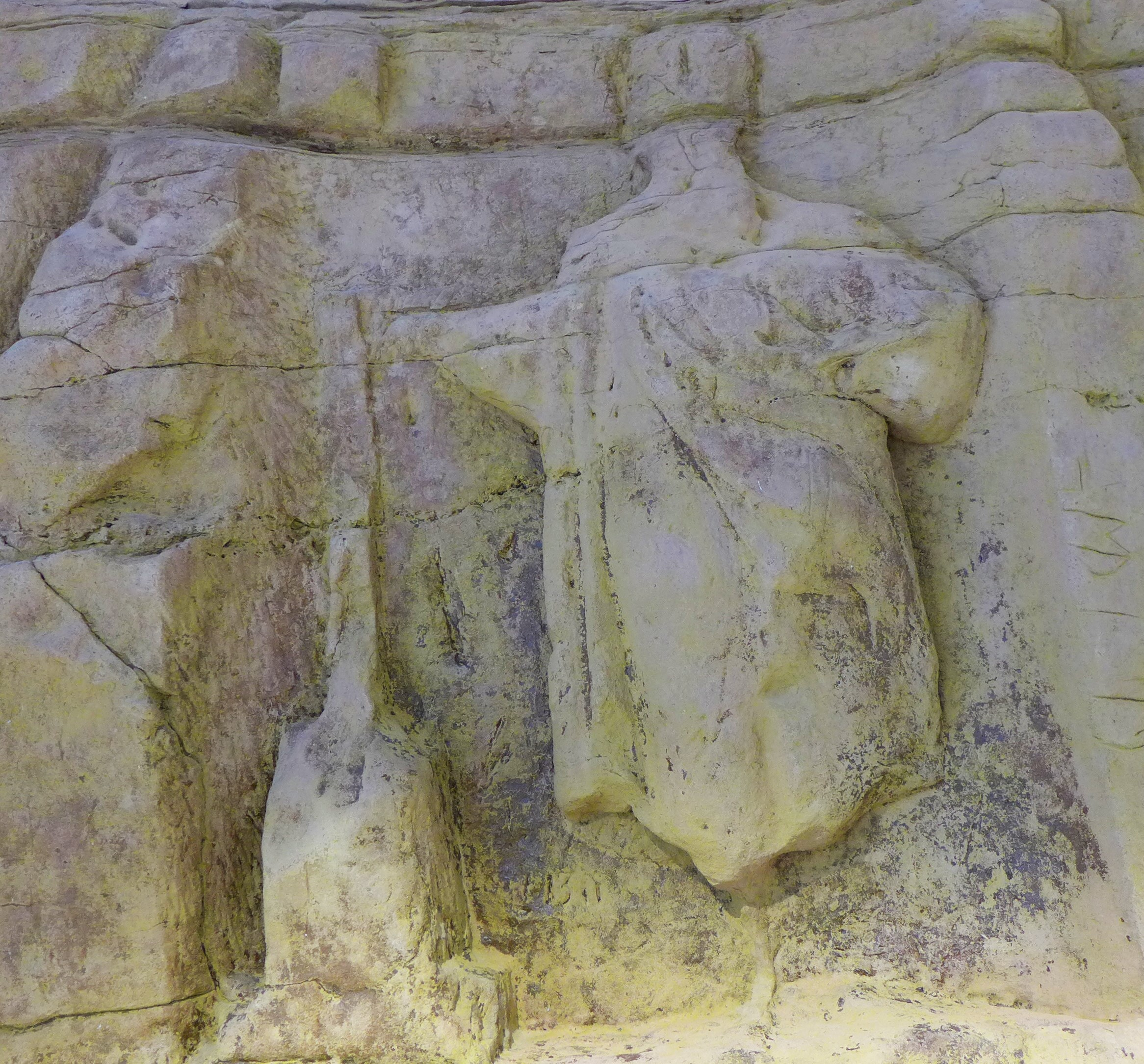 Wallerfangen, Blauwald, Gallo-Römisches Felsrelief "Drei Kapziner", Die in eine Felswand gemeißelten Reliefbilder sollen keltische Gottheiten darstellen, Auschnitt (Kopie im Historischen Museum Wallerfangen)